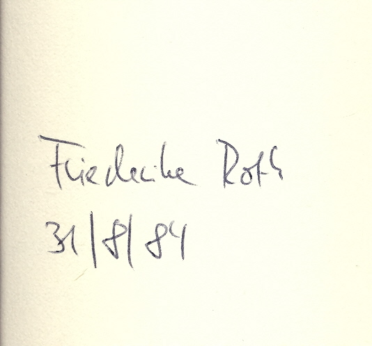 Autogramm von Friederike Roth